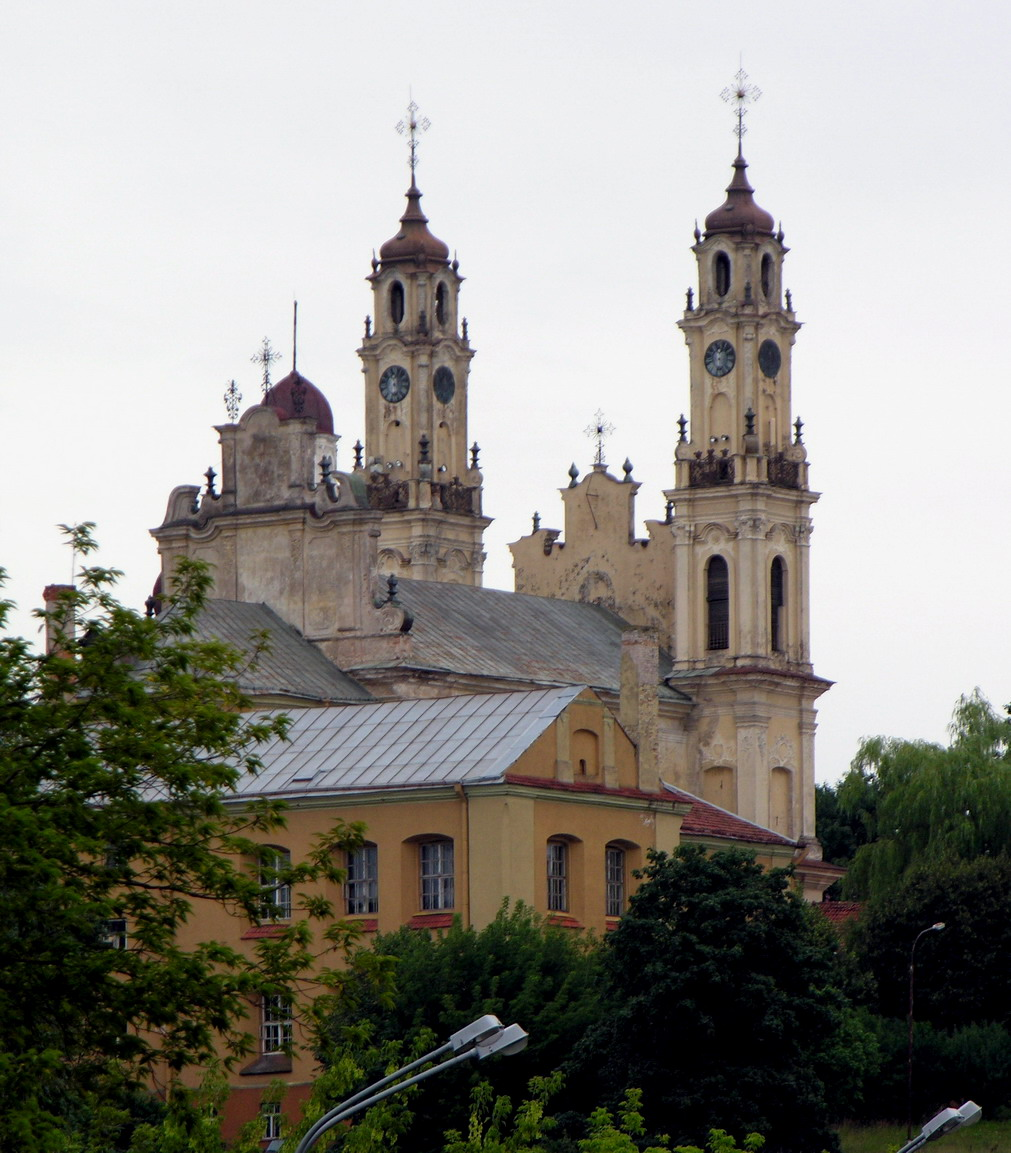 Vilnius Misionierių bažnyčios ir vienuolyno ansamblis Foto: Algirdas, 2006 m. rugpjūčio 8 d., Lietuva